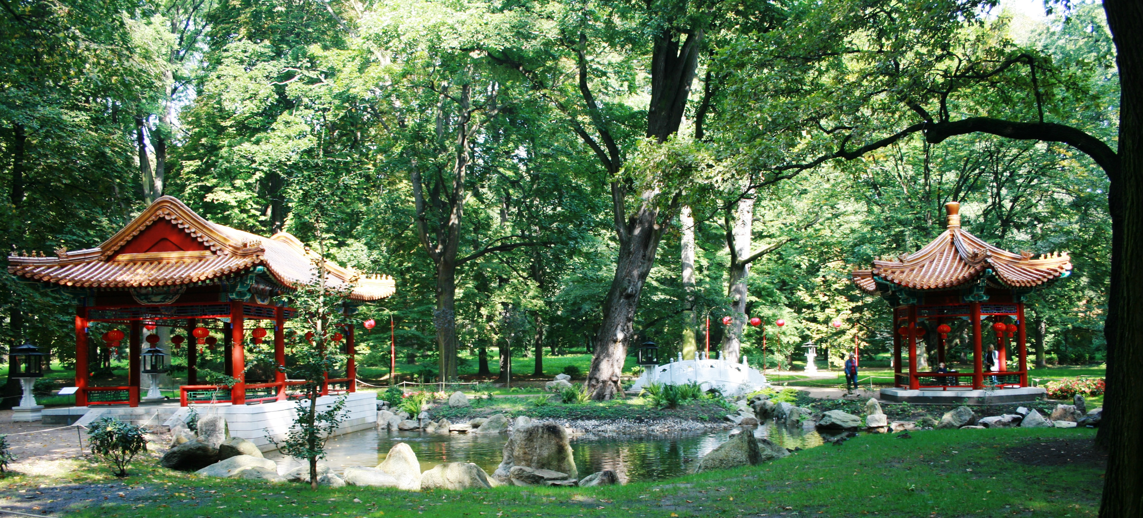 Widok ogólny Ogrodu Chińskiego w Łazienkach